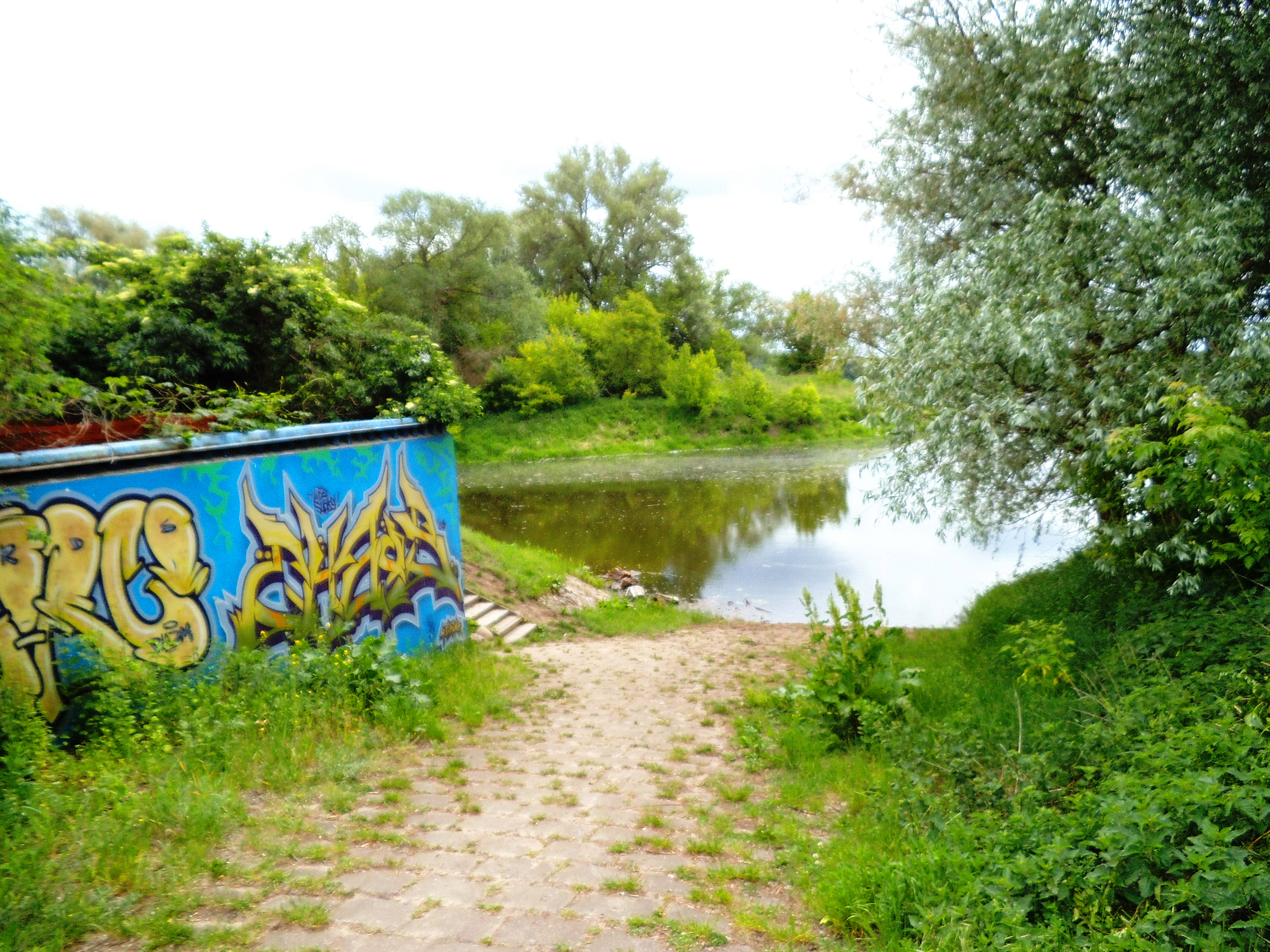 Dawna przystań AZS w Toruniu